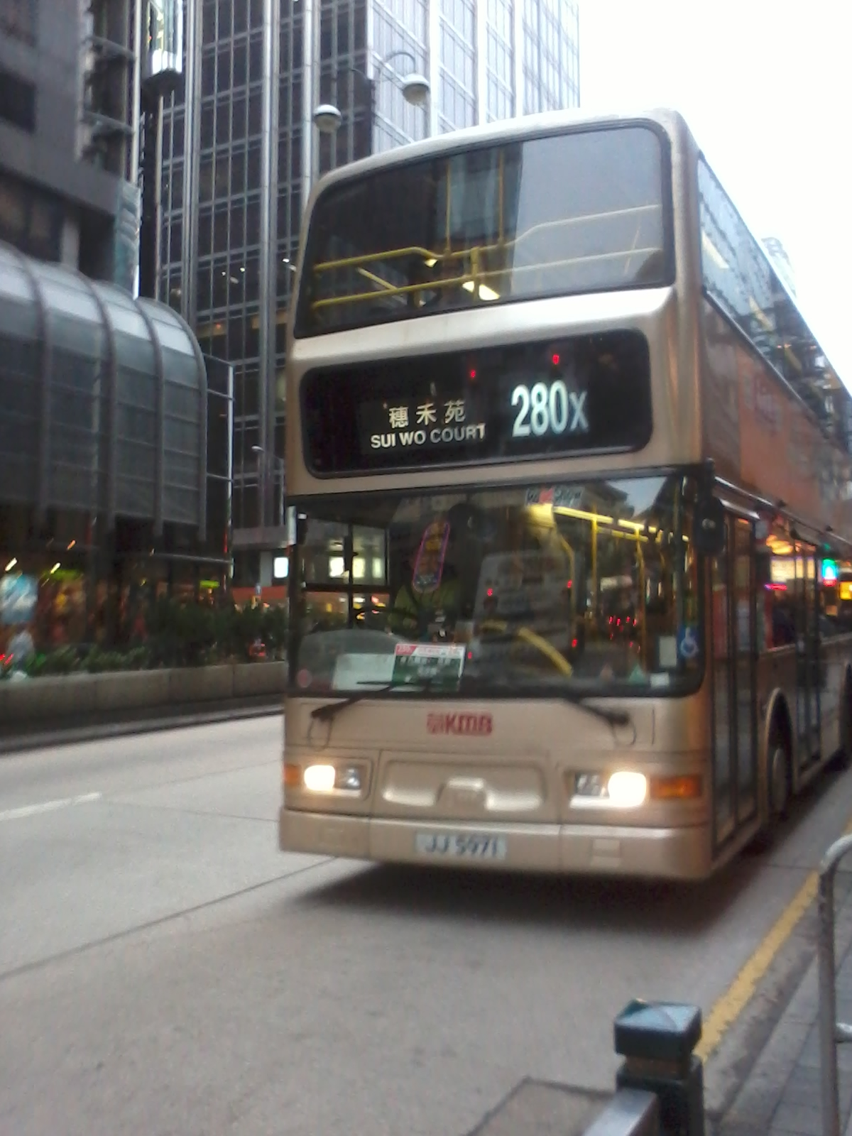 280X－J5971於柯士甸道（彌敦道）